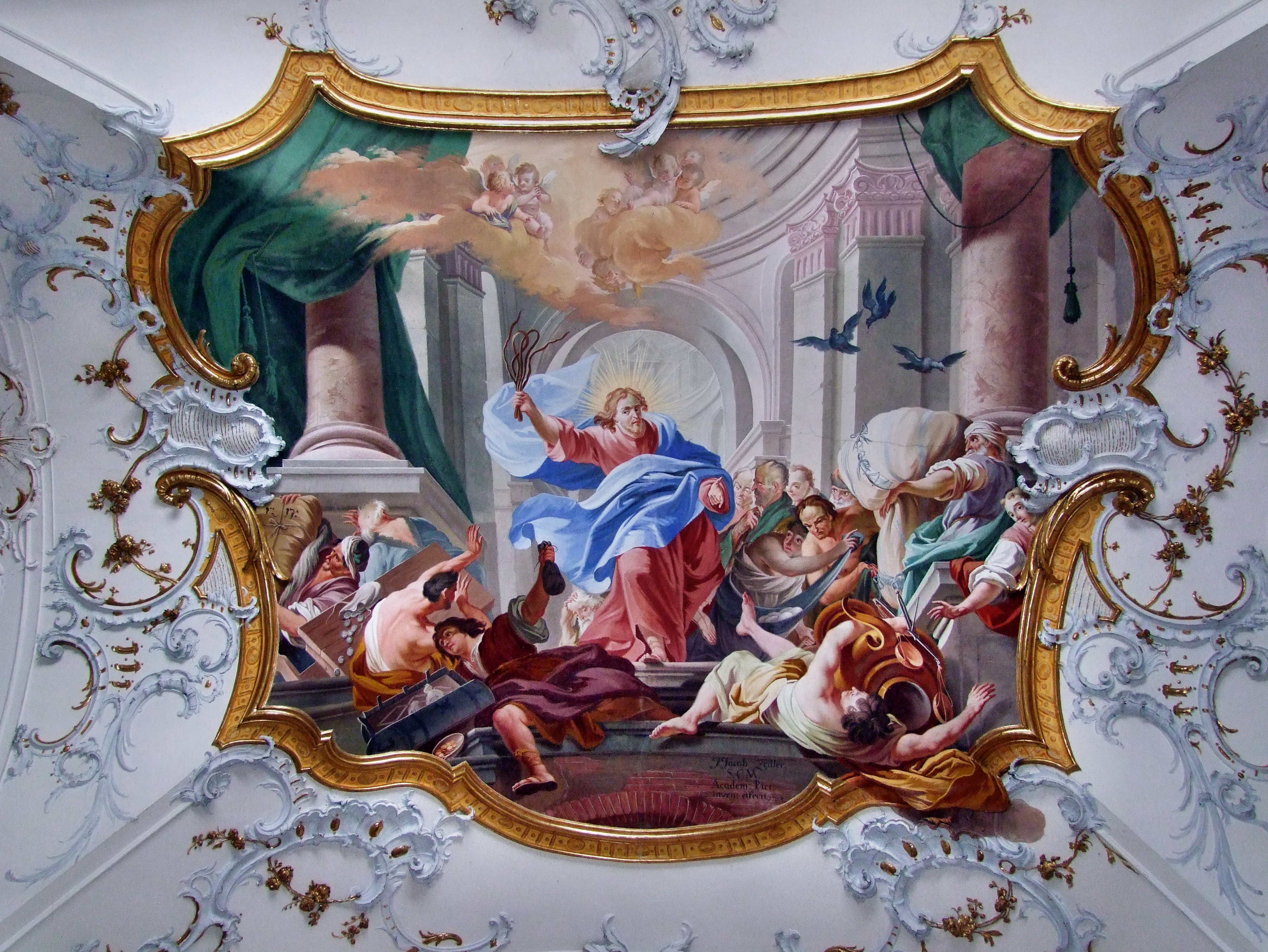 Tempelaustreibung Jesu - Fresko (F1), Basilika Ottobeuren